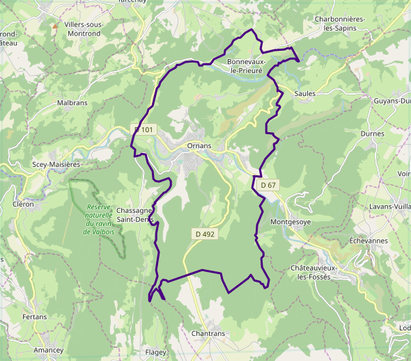 carte réalisée sur umap This map may be incomplete, and may contain errors. Don't rely solely on it for navigation.